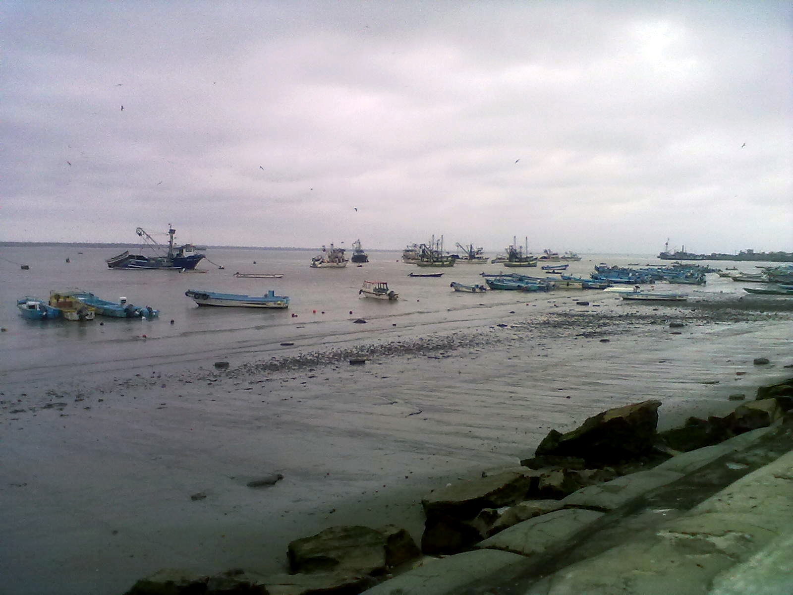 Puerto pesquero de Posorja.